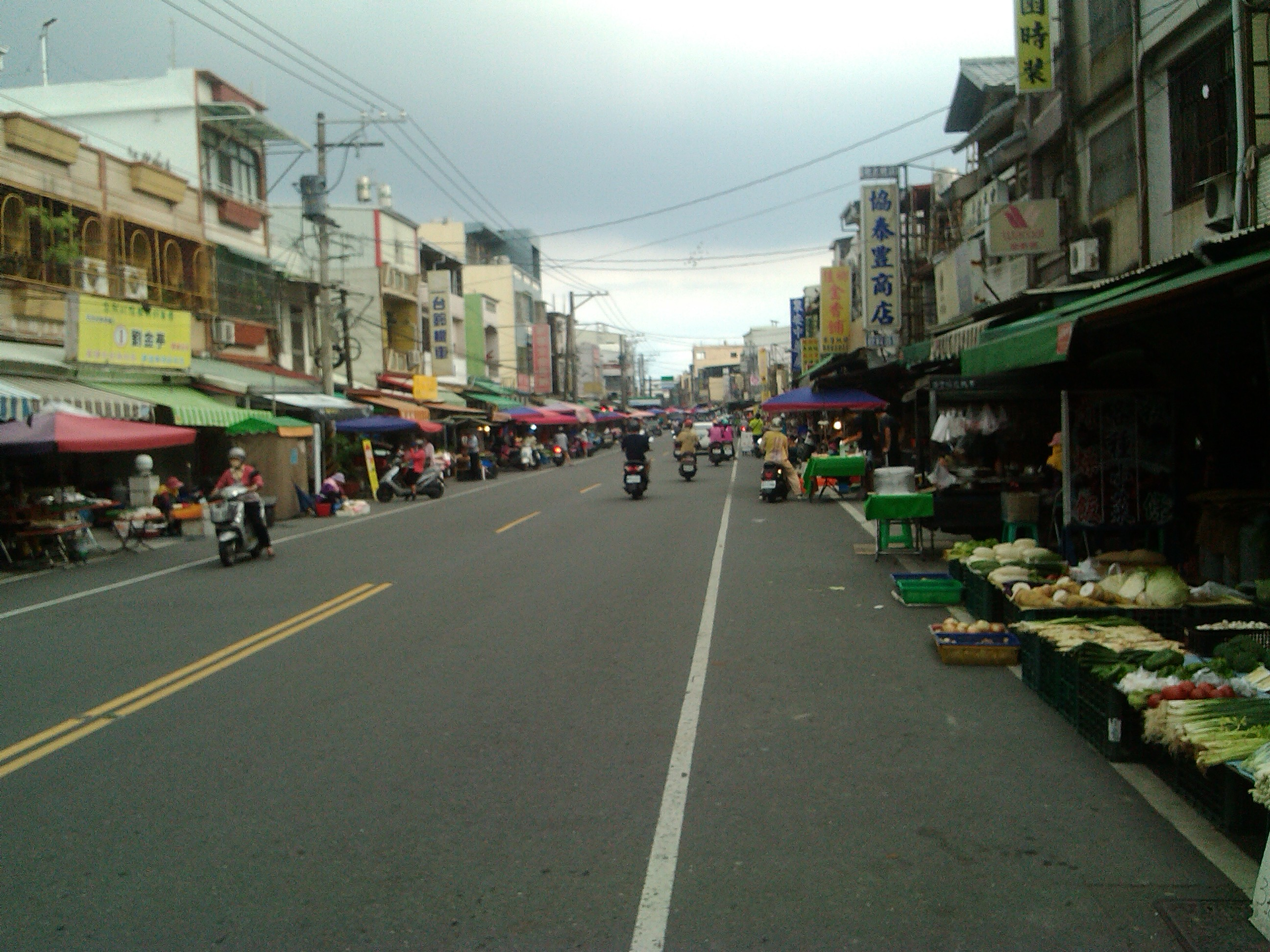 早上及下午都有擺攤 位於中華路 佳冬國中及新全聯周邊